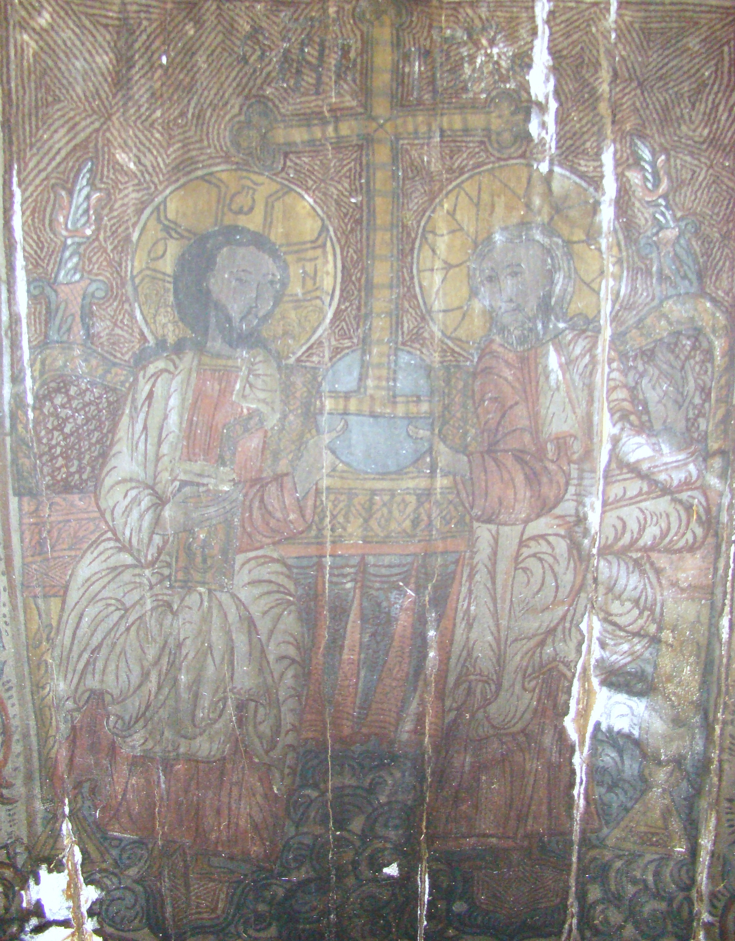 Biserica de lemn din Someșu Rece, județul Cluj